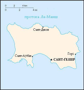 Мапа острова Джерсі.